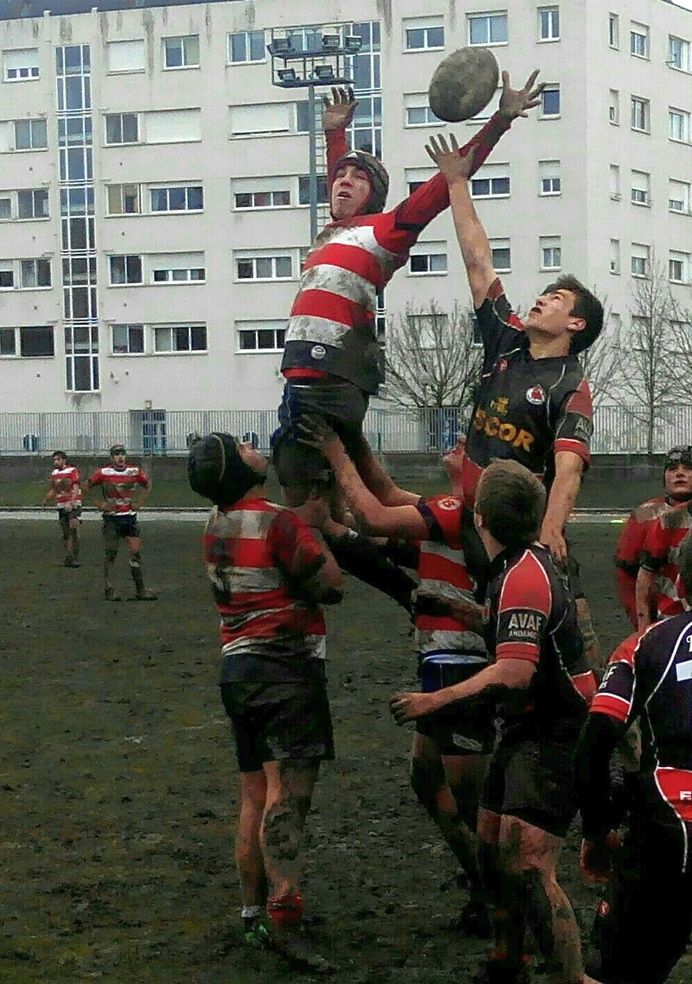 Gaztedi (eskuinean) eta Universitario Bilbo (ezkerrean eta erdian) klubetako 18 urtez azpiko taldeetako errugbi jokalariak, elkarren aurkako partidako bigarren denboran, Lakuako (Gasteiz) errugbi zelaian, 2016ko otsailaren 13ko 14:29an.